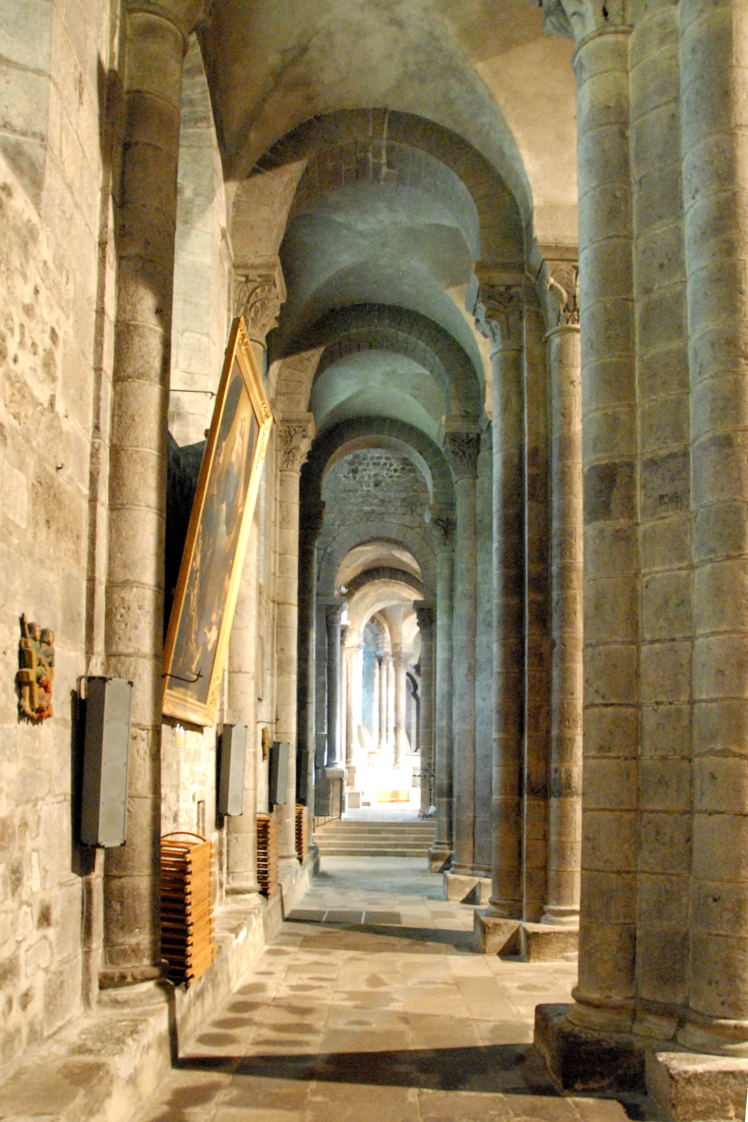 N.-Dame d'Orcival, nördl. Seitensxchiff nach vorne